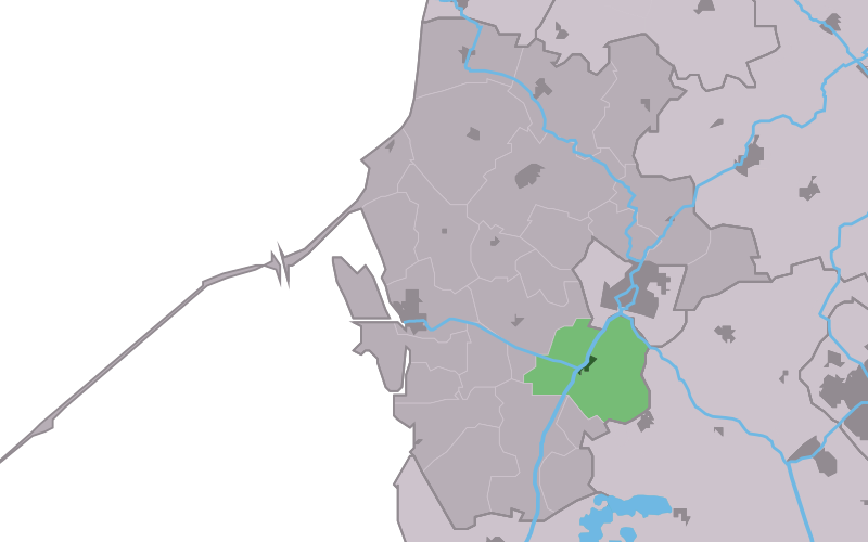 Kaartsje fan himrik fan Tsjerkwert